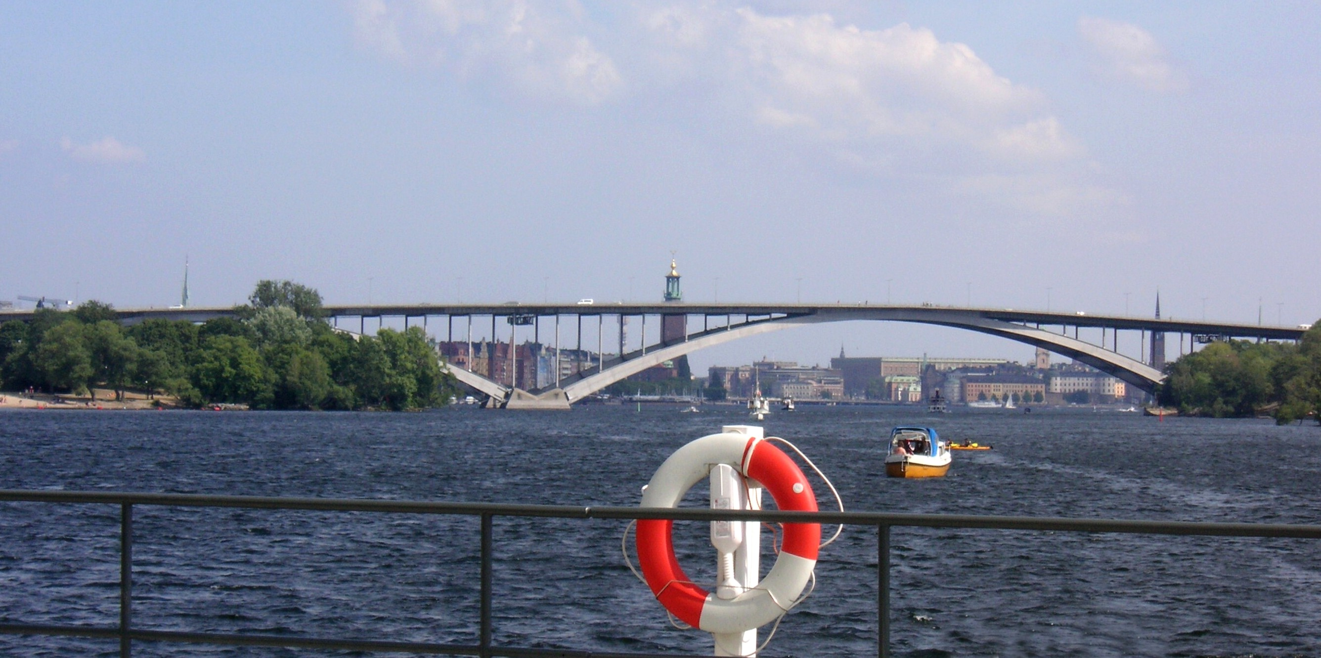 Mariebergsfjärden och Västerbron i Stockholm, vy från Lilla Essingen